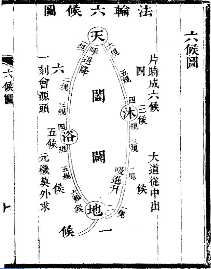 慧命經《法輪六候圖》